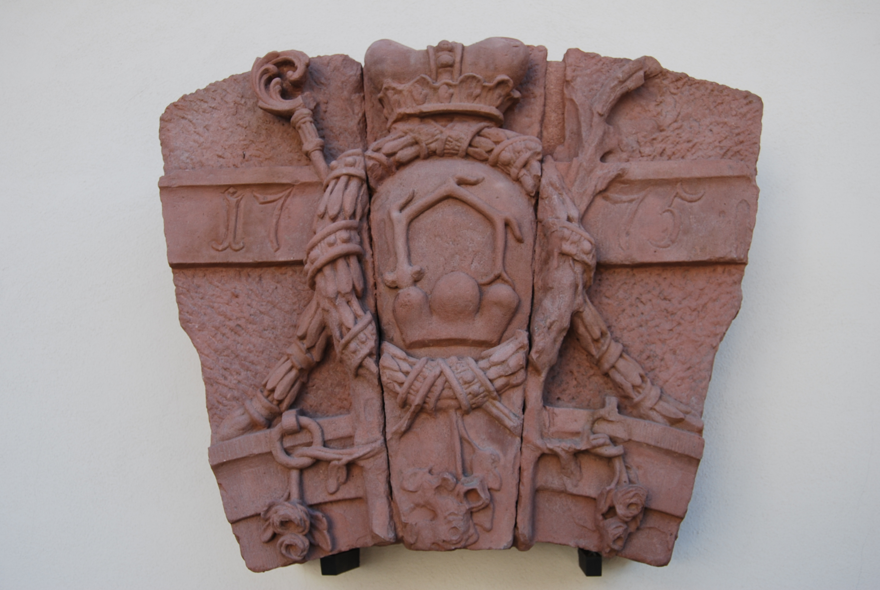 Wappenstein der letzten Äbtissin von Säckingen - Marianna Franziska von Hornstein